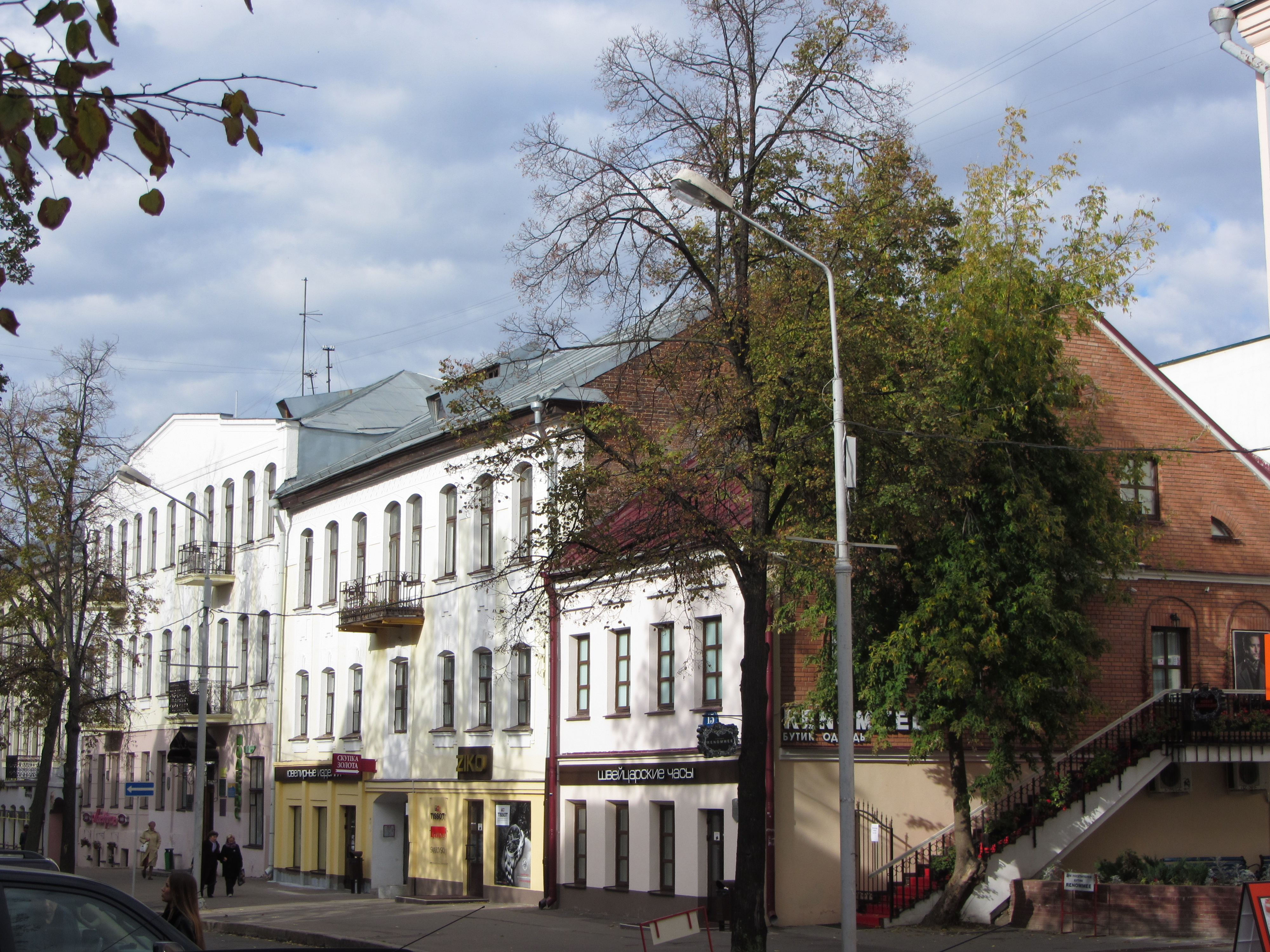 Беларуская (тарашкевіца): Камсамольская 15, 13, Менск